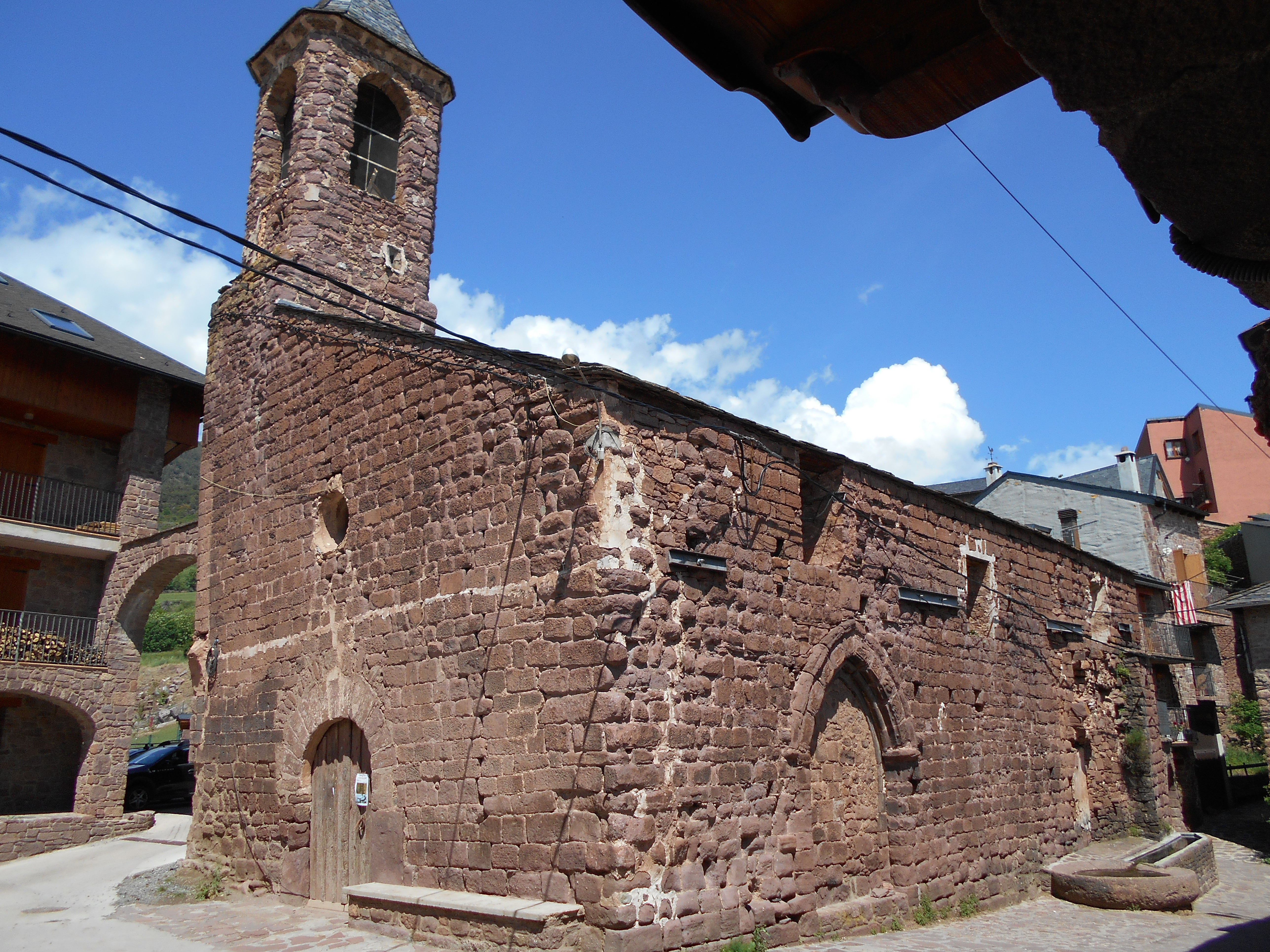 Façana meridional de l'església